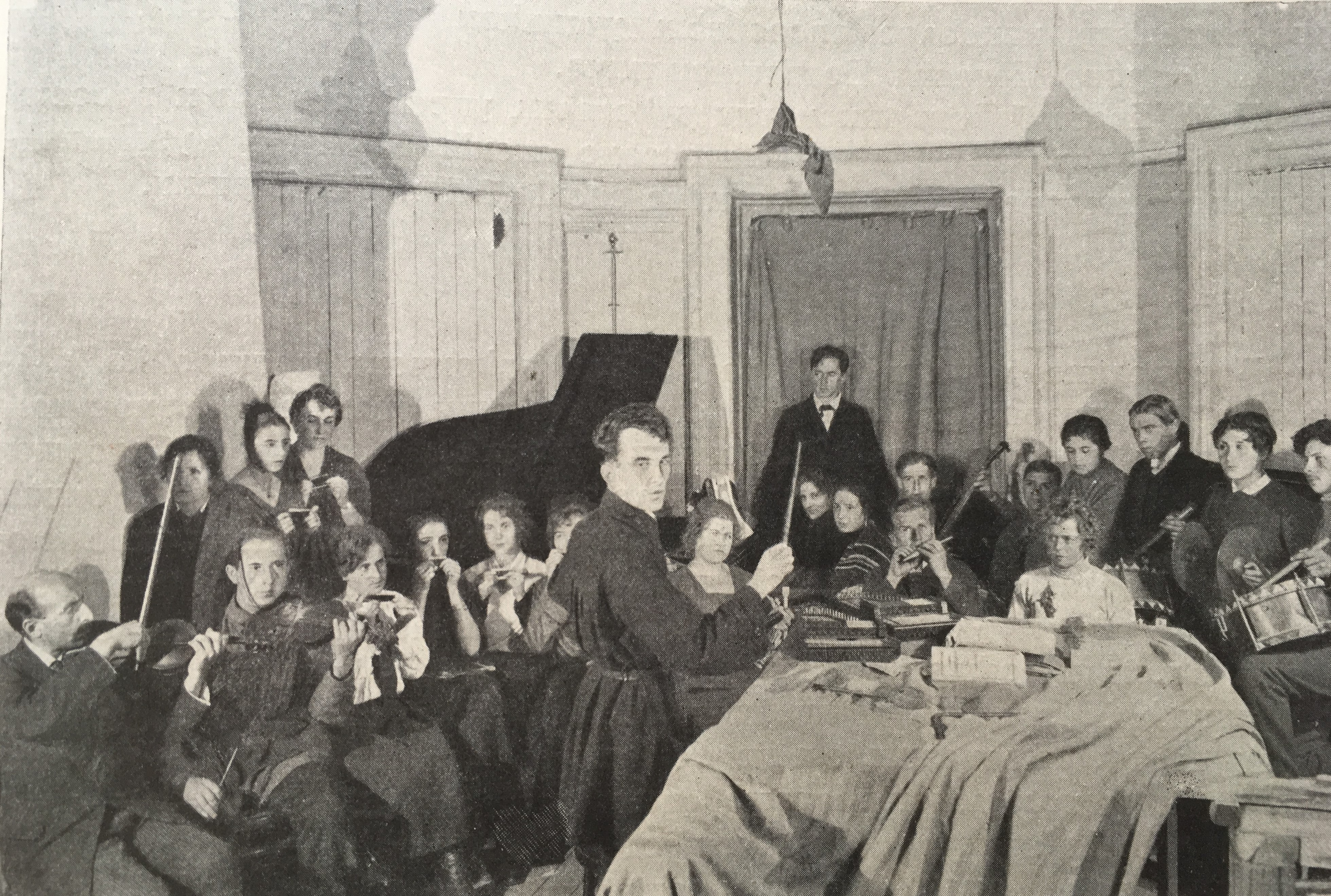 Александр Козловский дирижирует первым оркестром Третьей студии М. Х. Т.